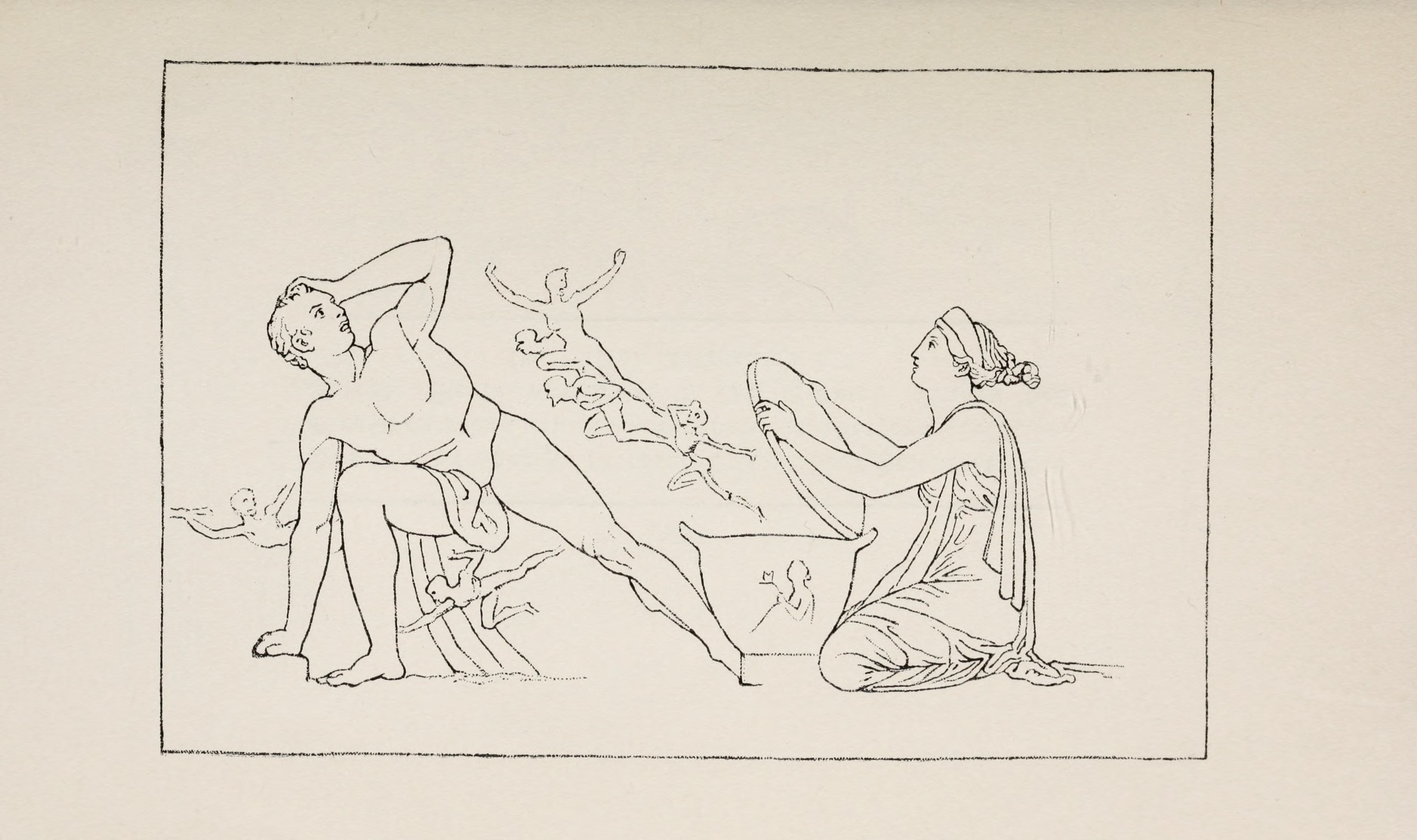 Pandora öffnet das Gefäß, in dem die Leiden und Übel verschlossen waren. Sie entschwärmen, nur die Hoffnung bleibt zurück. Hesiod, Werke und Tage V. 94. Schwab, Sagen des klassischen Altertums I. 5.